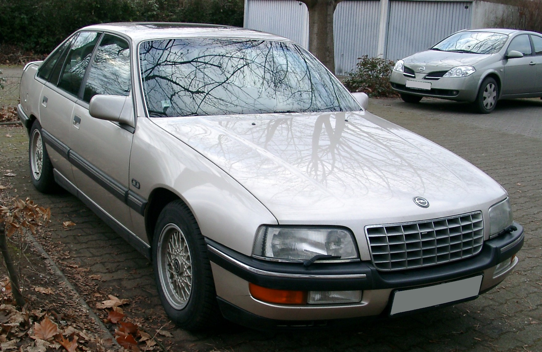 Opel Senator B